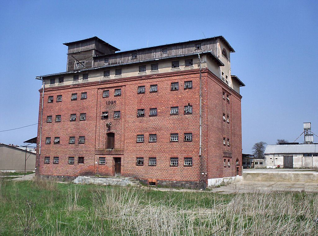 Troszyn (powiat gryfiński) - elewator